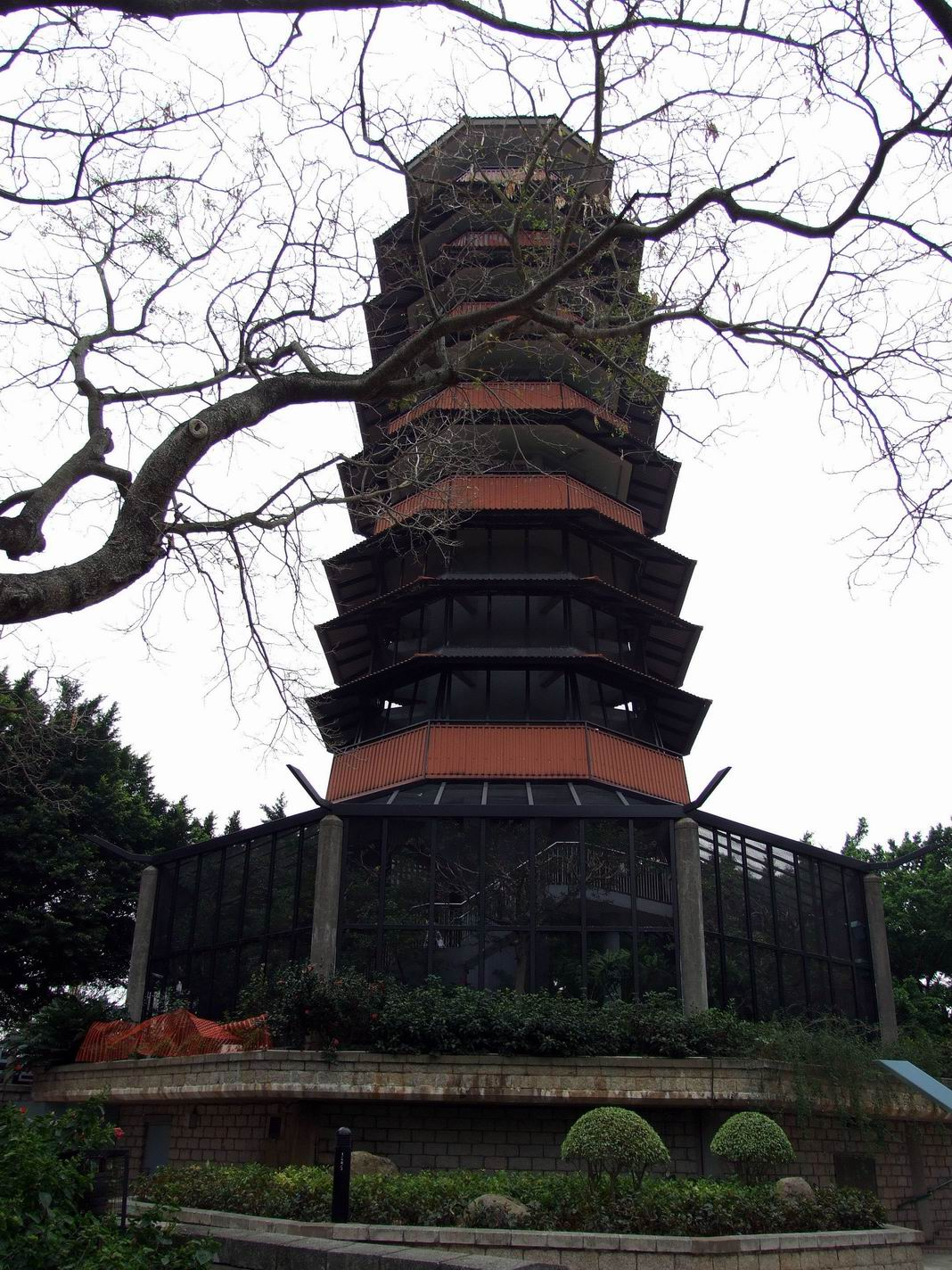 百鳥塔